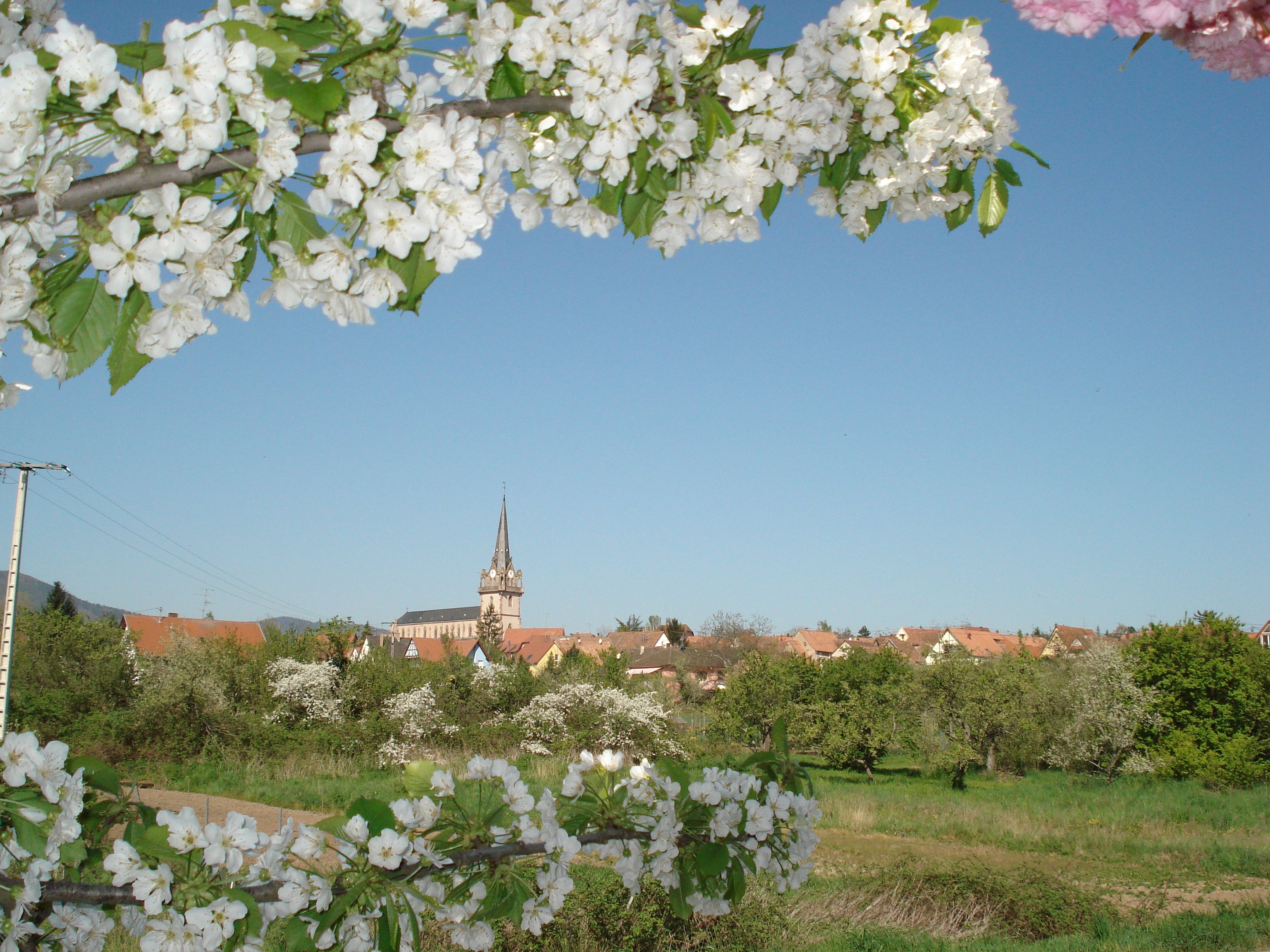 Bernardswiller au printemps